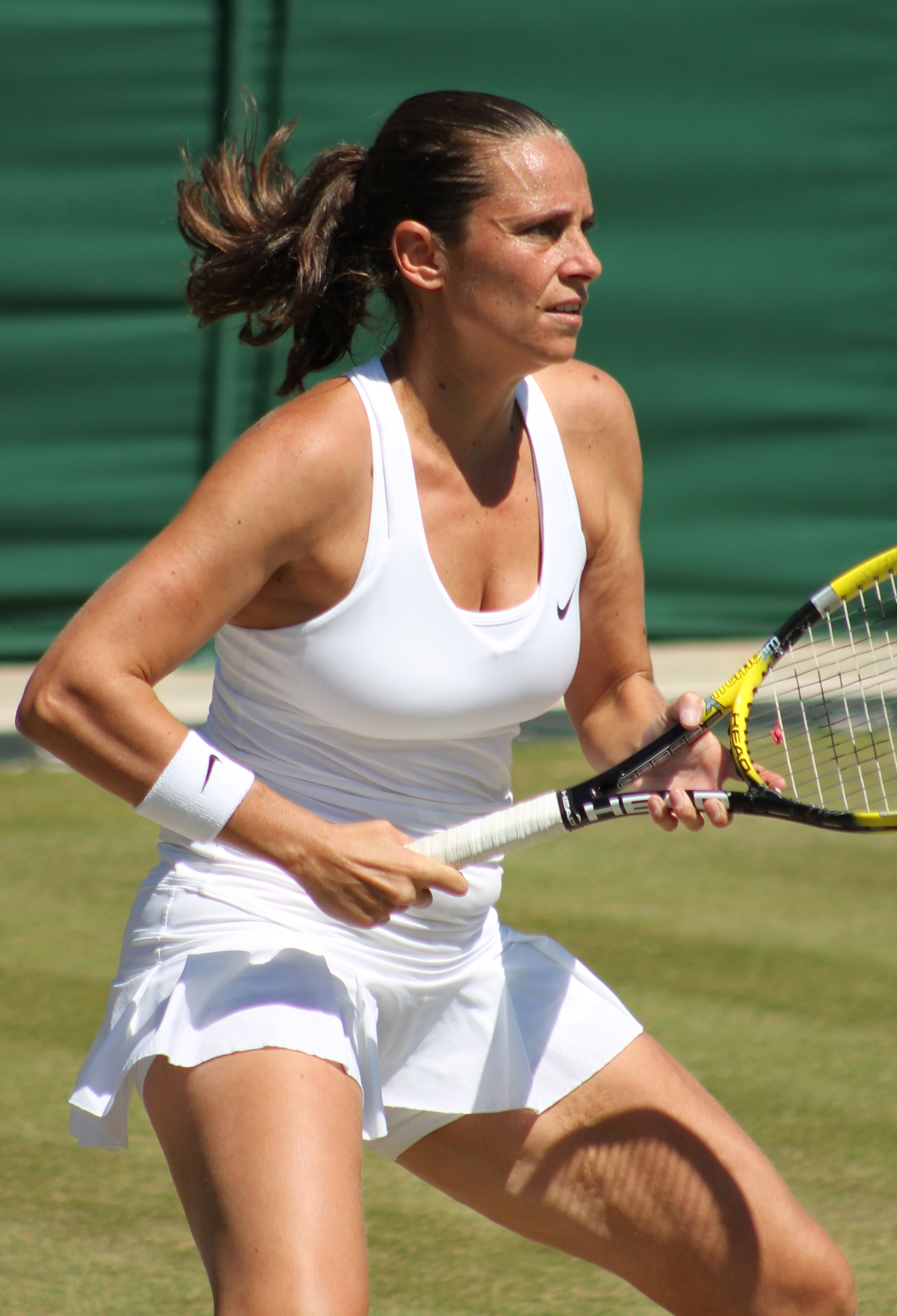 Vinci WM14 (1)